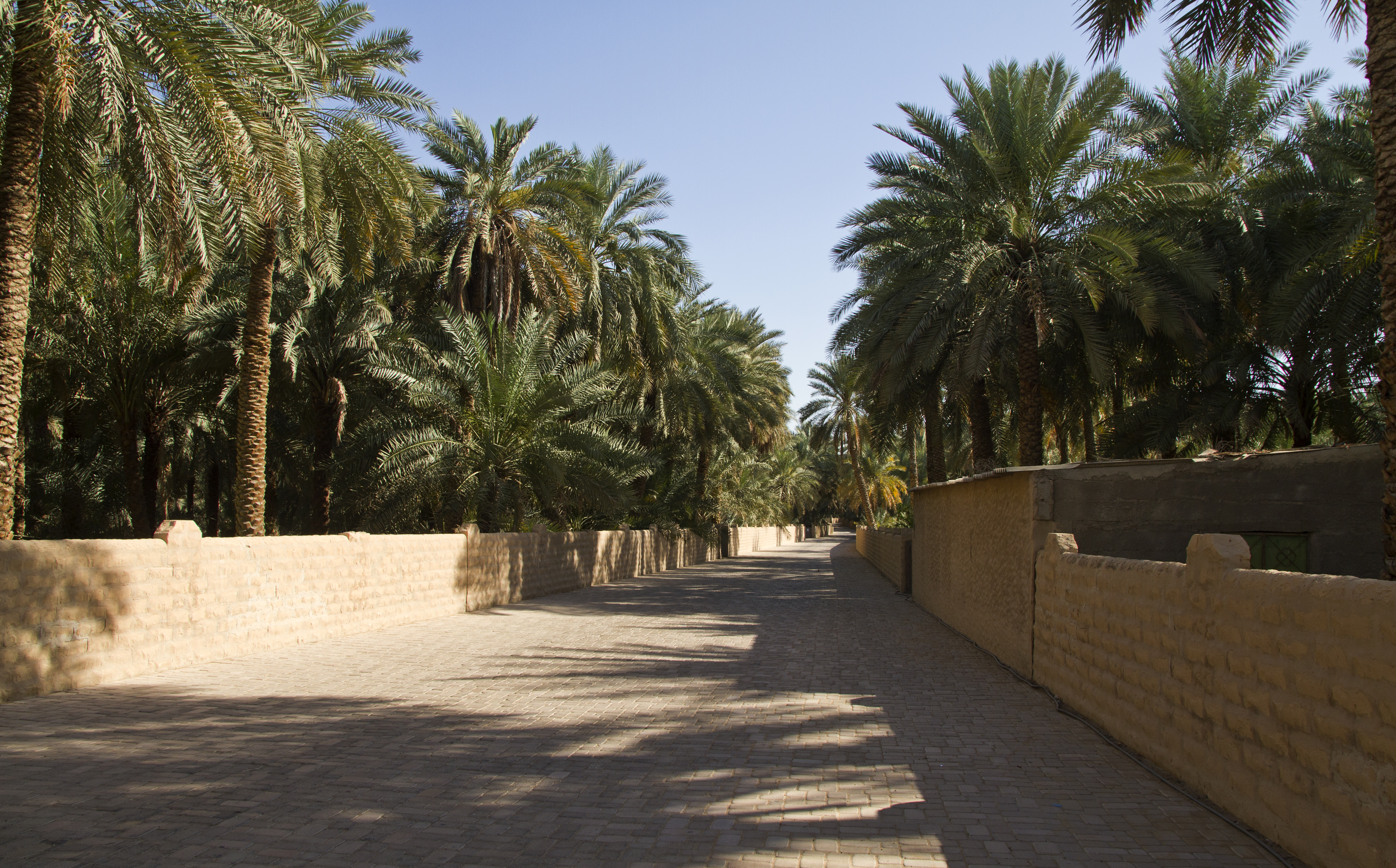 Al Ain Oasis, Al Mutawaa - Abu Dhabi - United Arab Emirates